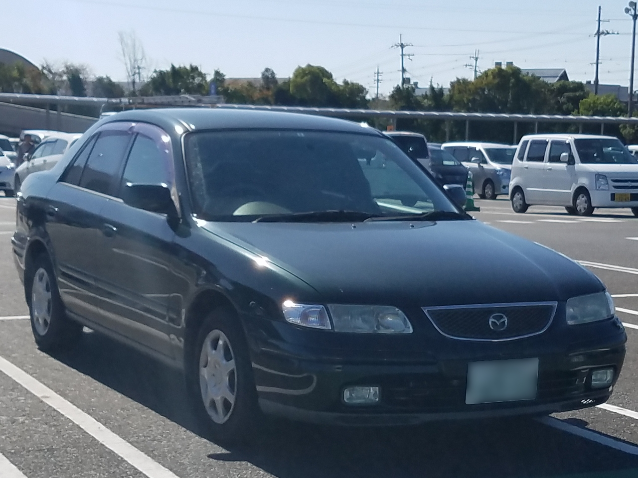 カペラ Li(前期型)